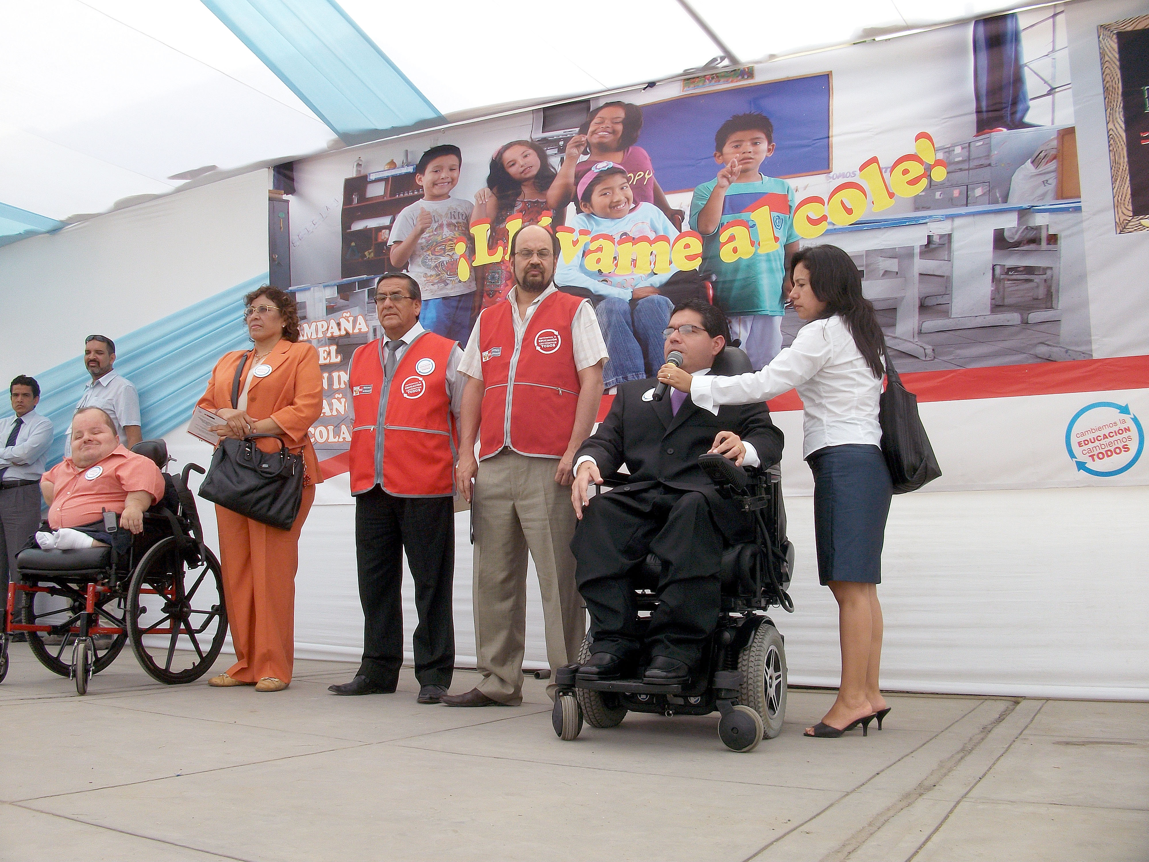 El tercer vicepresidente del Congreso, Michael Urtecho, y los congresistas Gian Carlo Vacchelli, y Jhon Reynaga, participaron en el lanzamiento de la campaña de matrícula escolar de niños, adolescentes y jóvenes con algún tipo de discapacidad que este año espera atender a 45 mil. El acto, encabezado por el viceministro de Educación Pedagógica, Martín Vega Torres, se desarrolló en el IE Carlos Wiesse, de Comas.